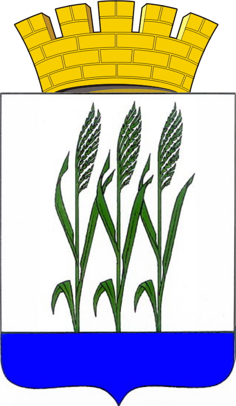 Герб города Камышин Камы́шин — город в России, в центральной части Волгоградской области, административный центр Камышинского района Волгоградской области.